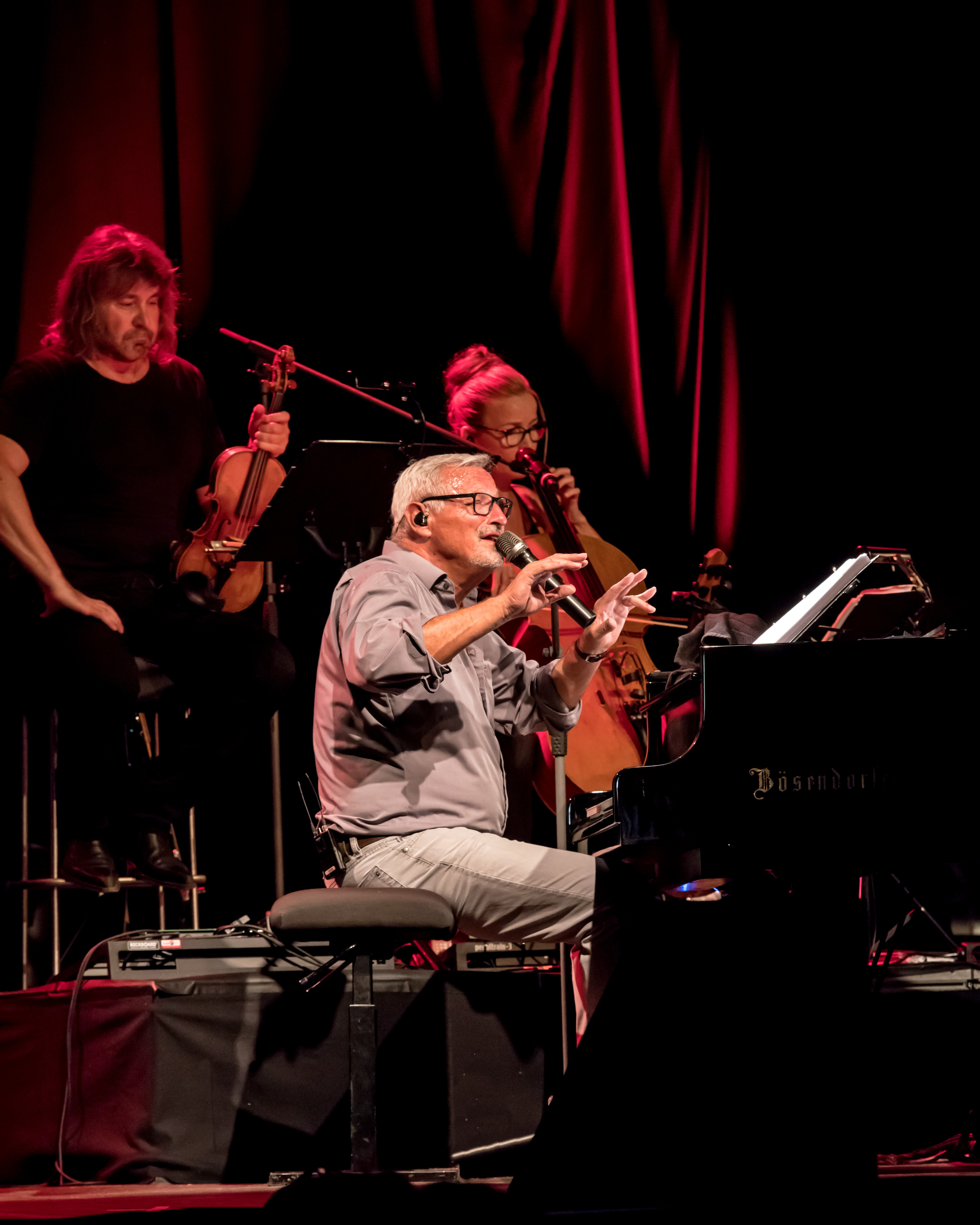 Bilder vom Zelt Musik Festival 2017 in Freiburg im Breisgau Konstantin Wecker (ZMF 2017) am 17.07.2017